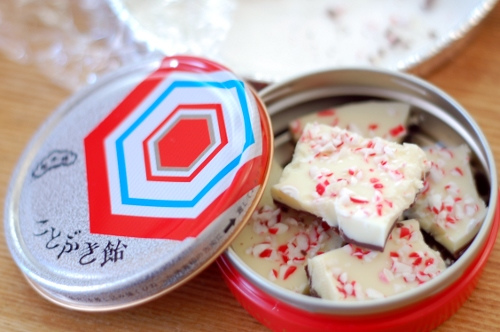 Peppermint Bark